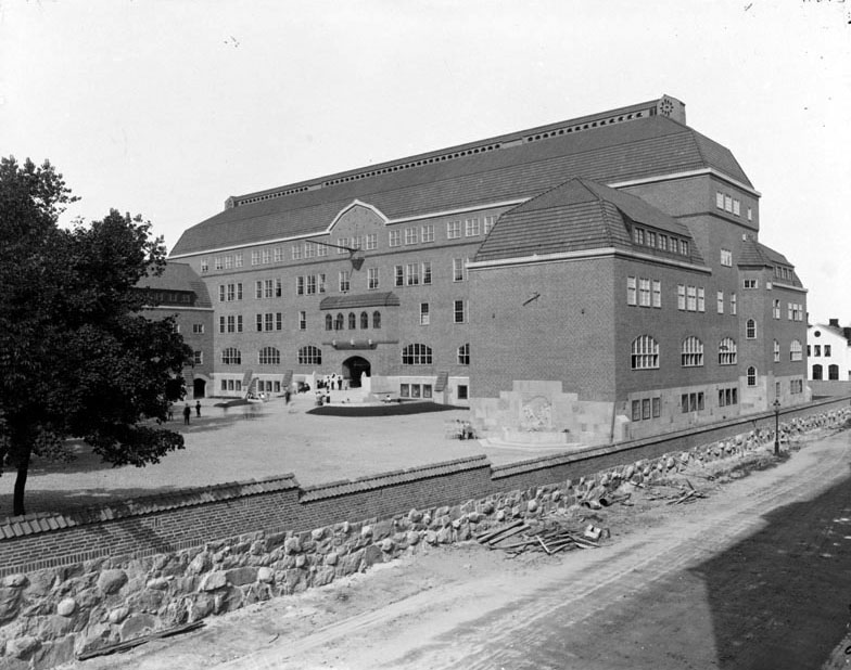 Östermalms läroverk vid Karlavägen från Skeppargatan. 1910